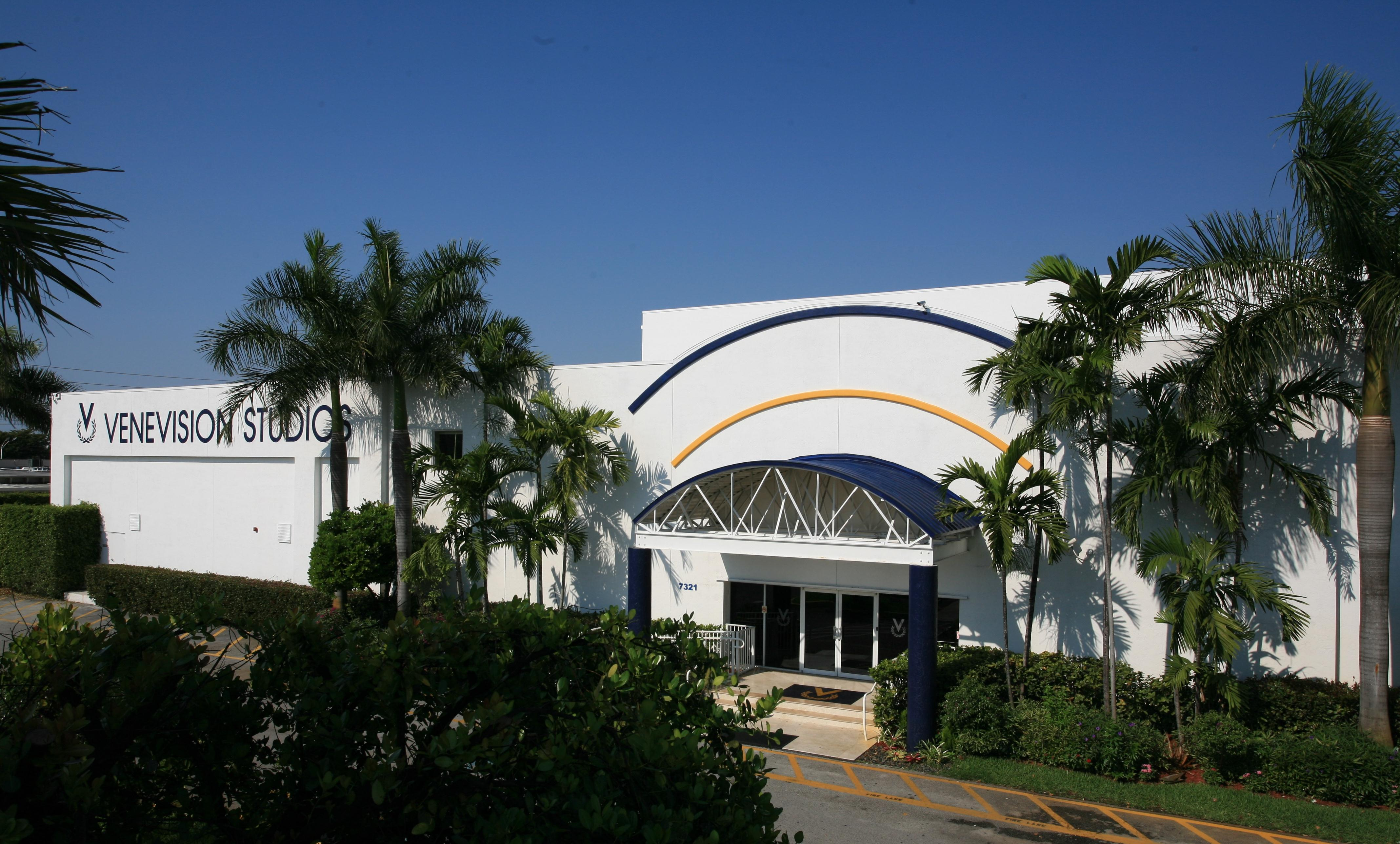 Estudios de la productora Venevisión en Miami (Estados Unidos)